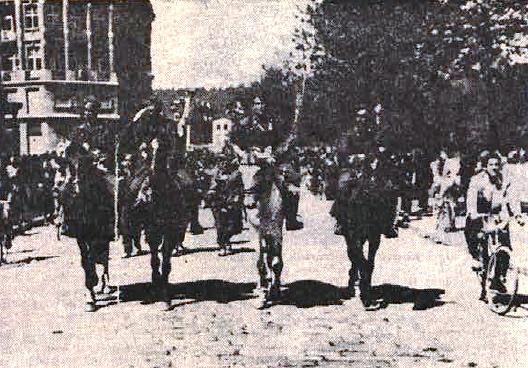 12. brigada del 15. slovenske divizije v Ljubljani, 9. maj 1945